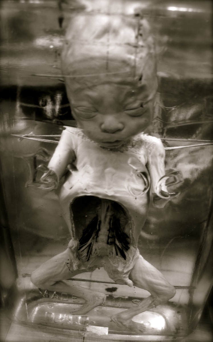 Test Nucléaire Semipalatinsk, effet des radiations sur le foetus